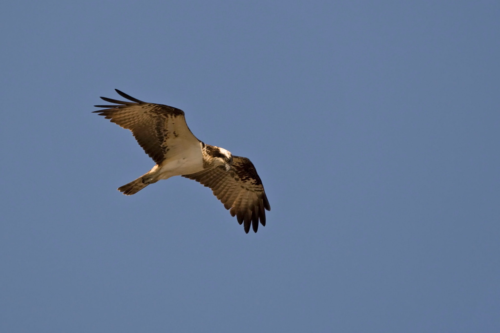 falco nei cieli di ugento